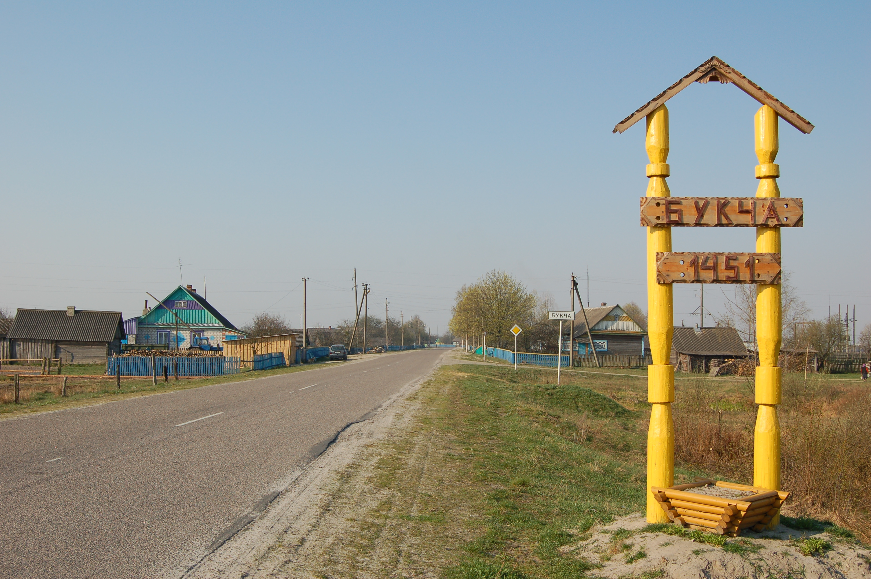 Букча: въезд в деревню со стороны Лельчиц и Турова